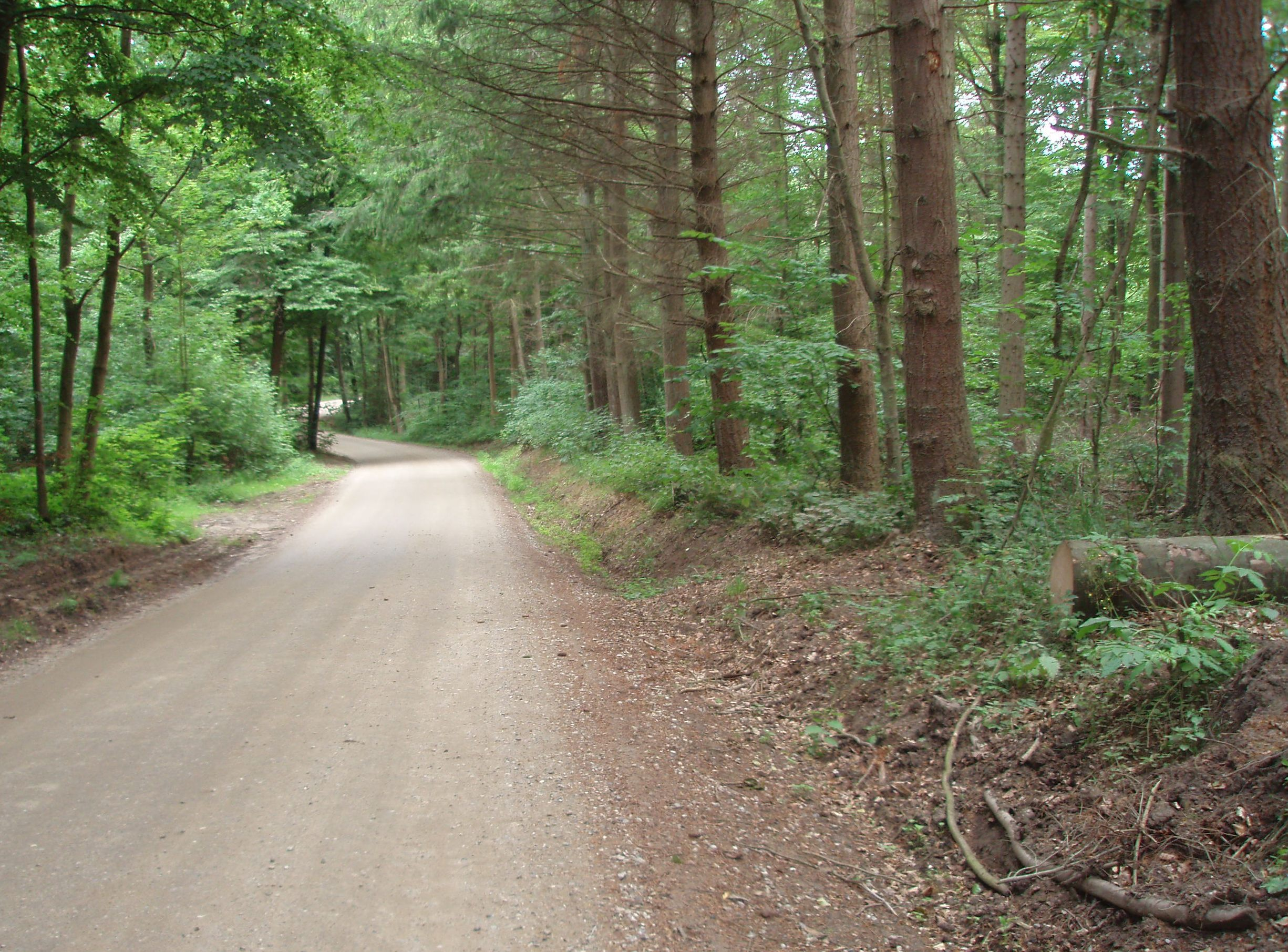 Nørreskoven i Nordborg. Blik mod sydøst ad Nørreskovvej